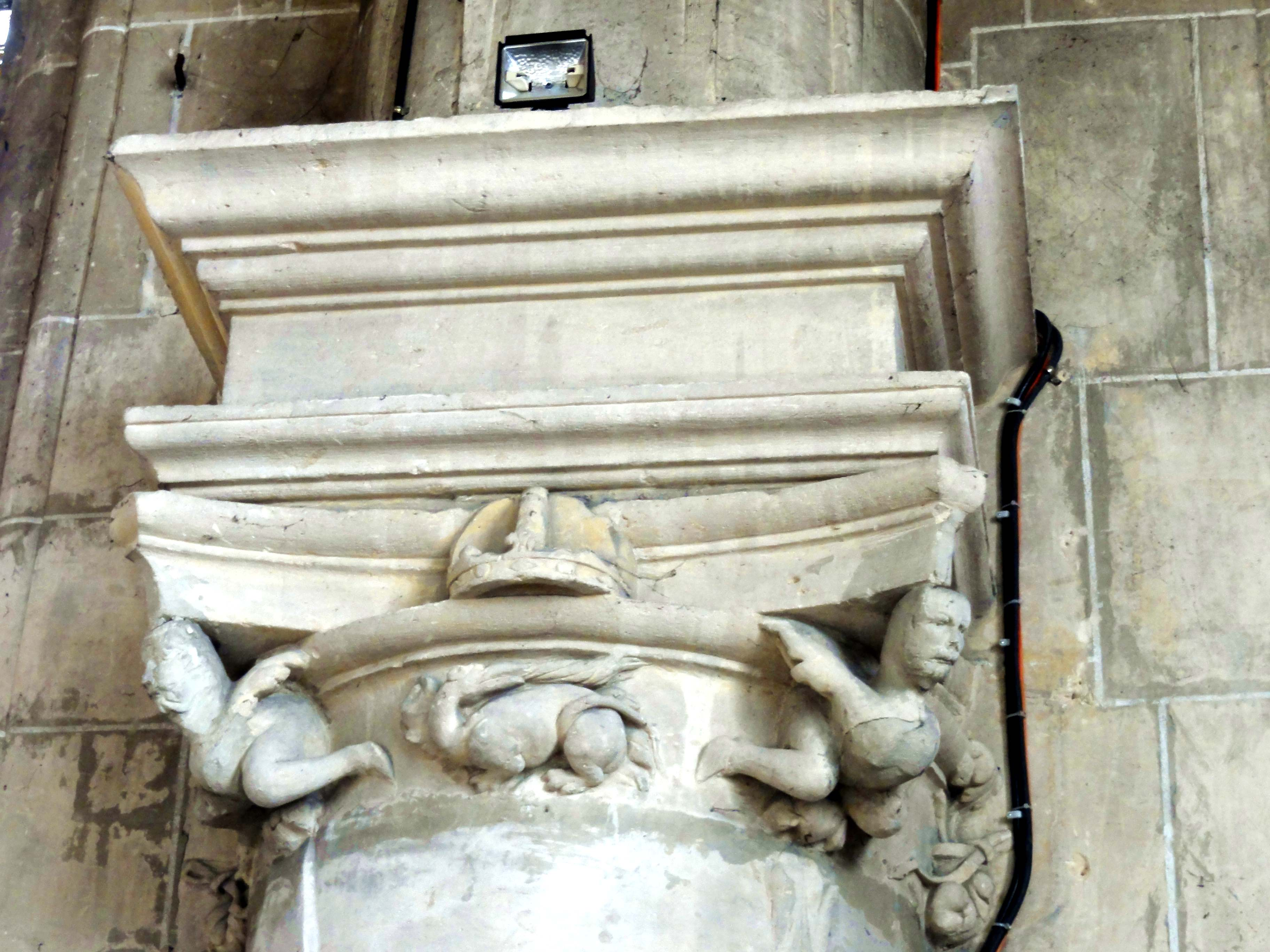 Chapiteau(x) de l'église - voir titre.